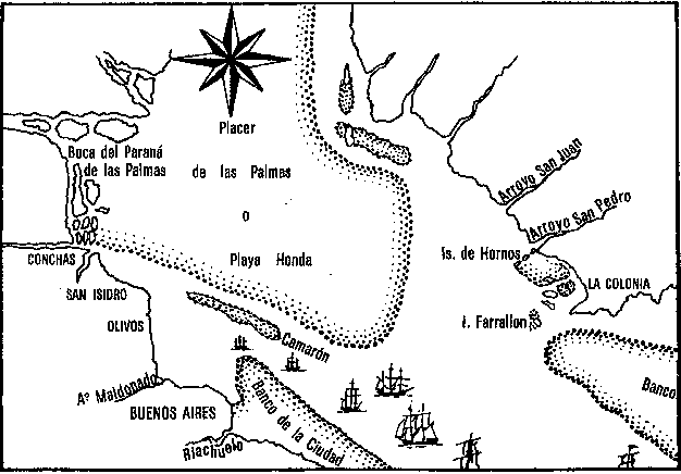 Area de Buenos Aires, 1826